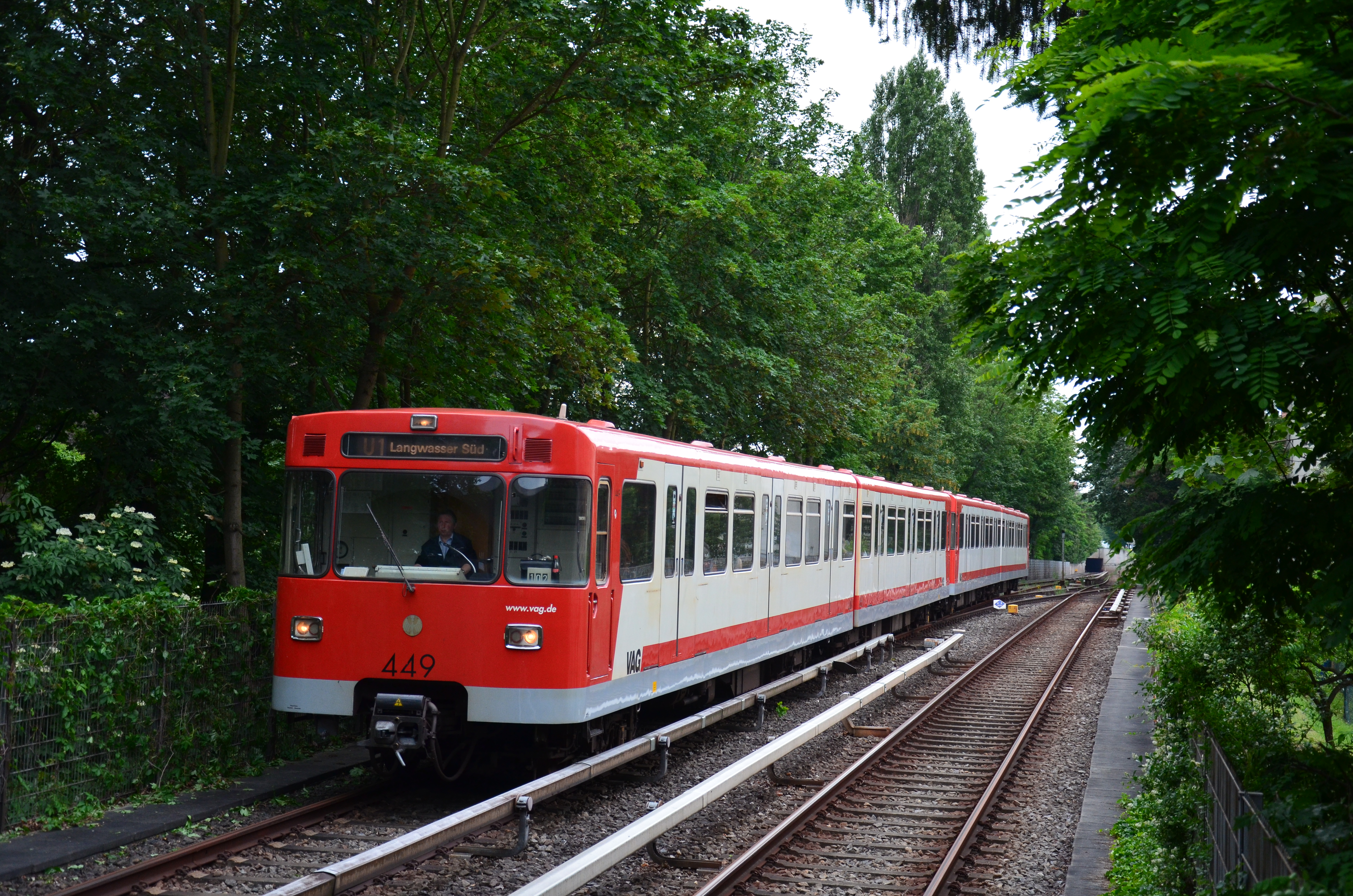 Matériel roulant DT1 sur la ligne U1 du métro de Nuremberg (U-Bahn U1), à Stadtgrenze.